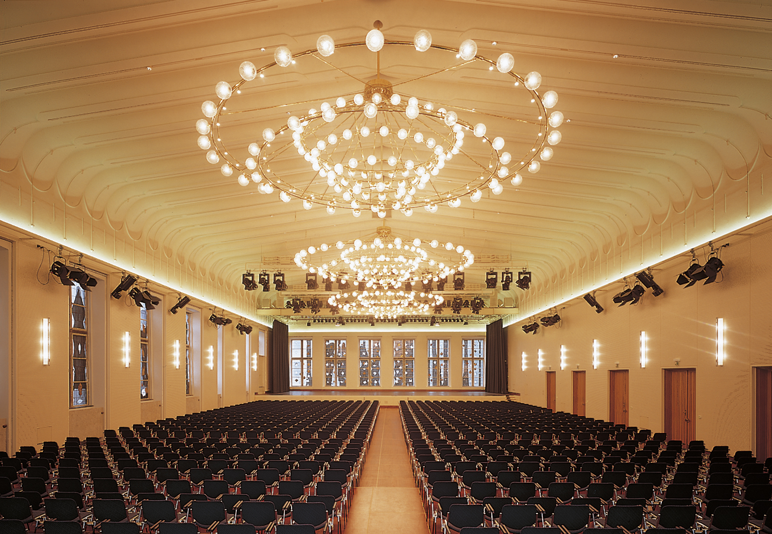 Festhalle Gürzenich in Köln, Großer Saal